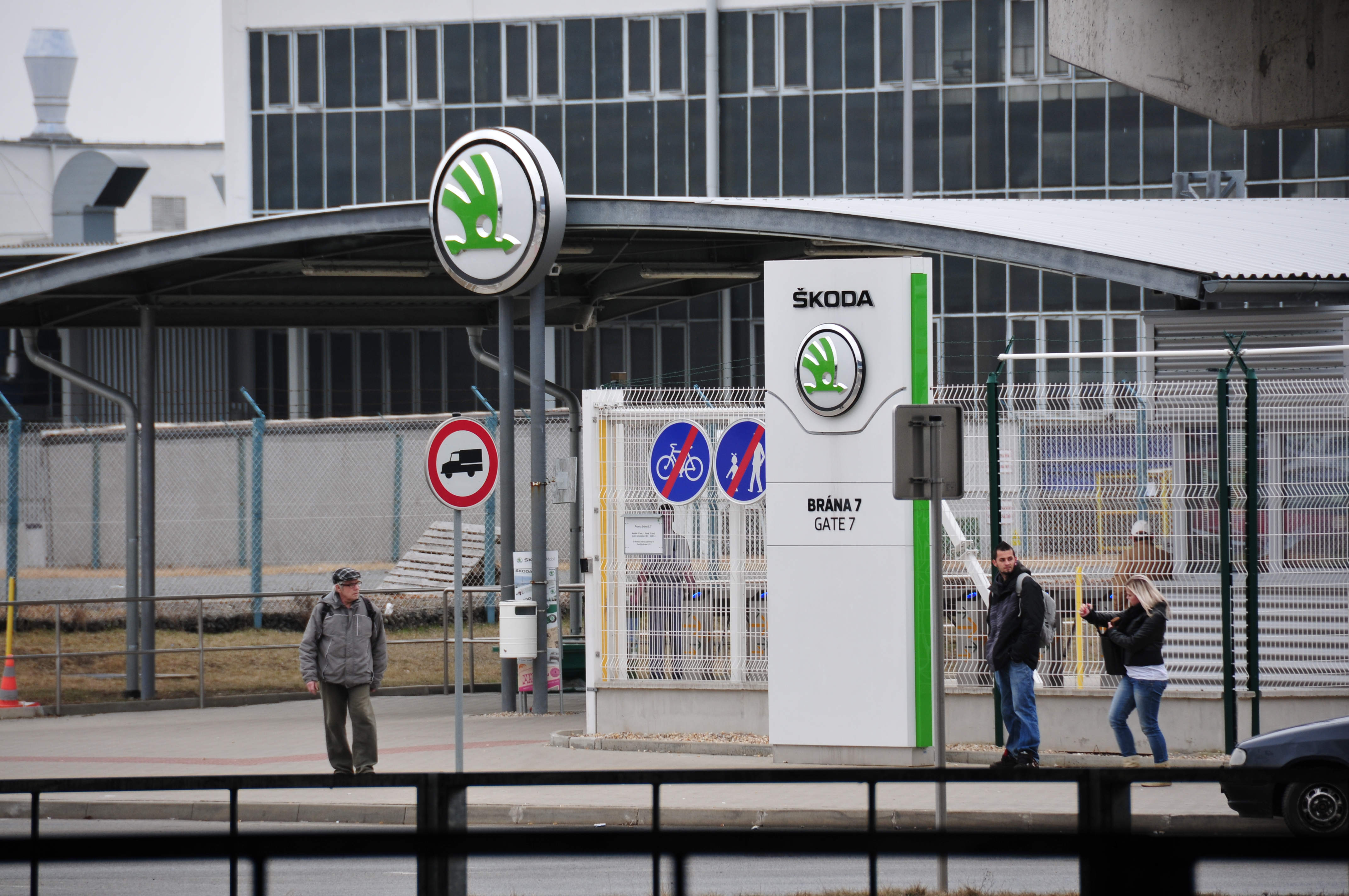 Fototermin Škoda Museum Mladá Boleslav 2013 Fototermin Škoda Muzeum 5. April 2013 in Mladá Boleslav This work is free and may be used by anyone for any purpose. If you wish to use this content, you do not need to request permission as long as you follow any licensing requirements mentioned on this page.